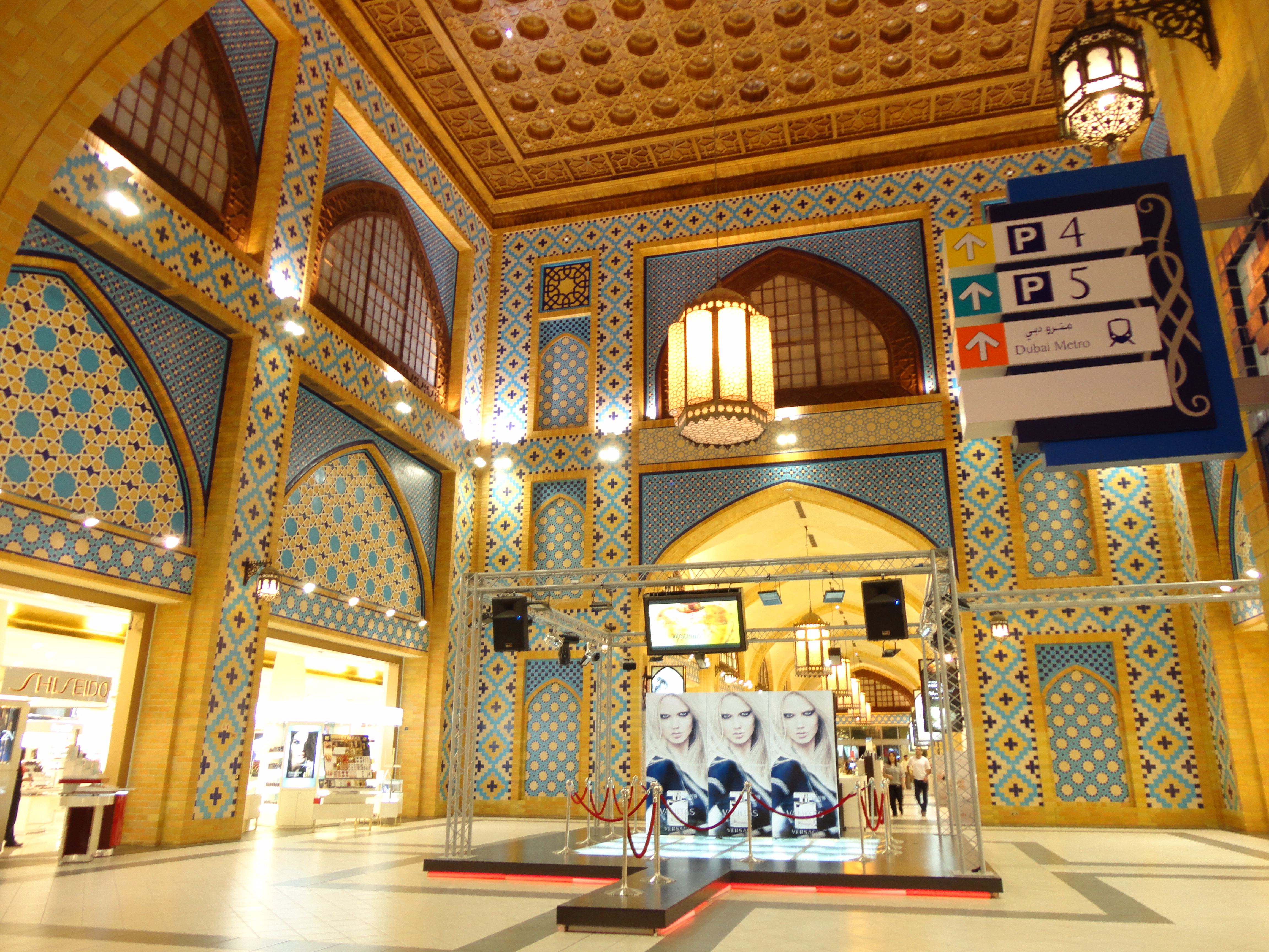 قسمت ایرانی مرکز خرید ابن بطوطه در دبی، امارات متحده عربی در فروردین ۱۳۹۱